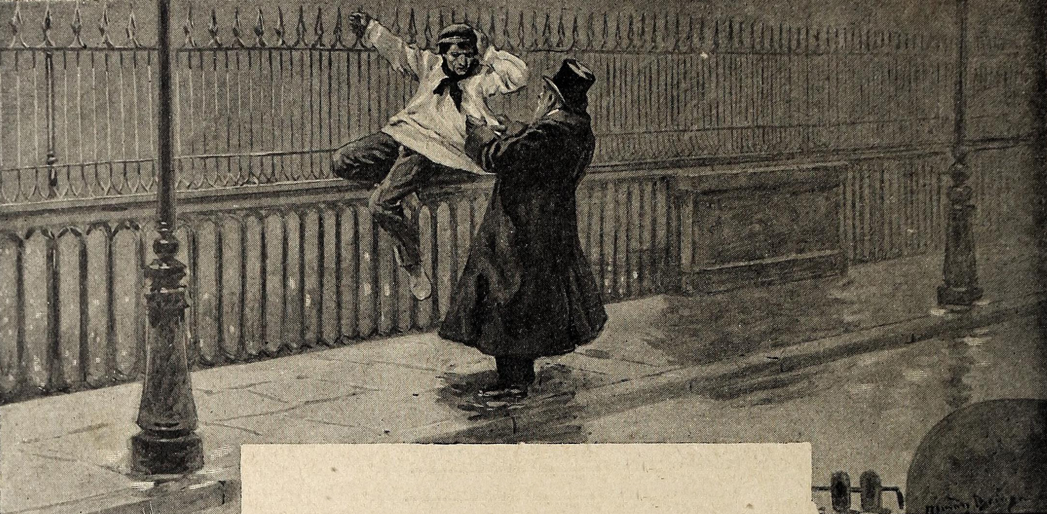 La gratitud, ó los pájaros fritos.